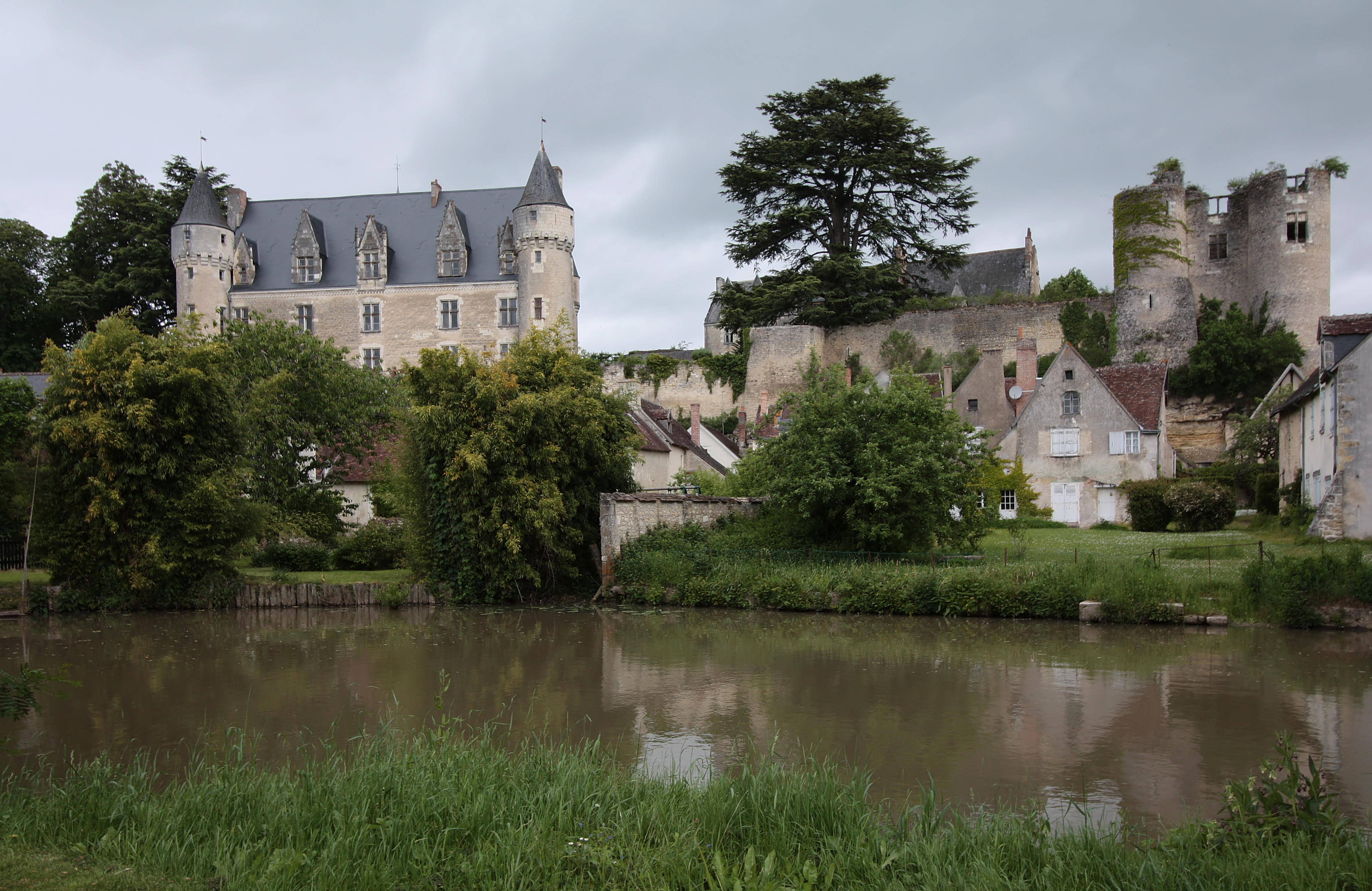 Schloss Montrésor im Département Indre-et-Loire/Frankreich - Die Schlossanlage vom Fluss Indrois aus gesehen.